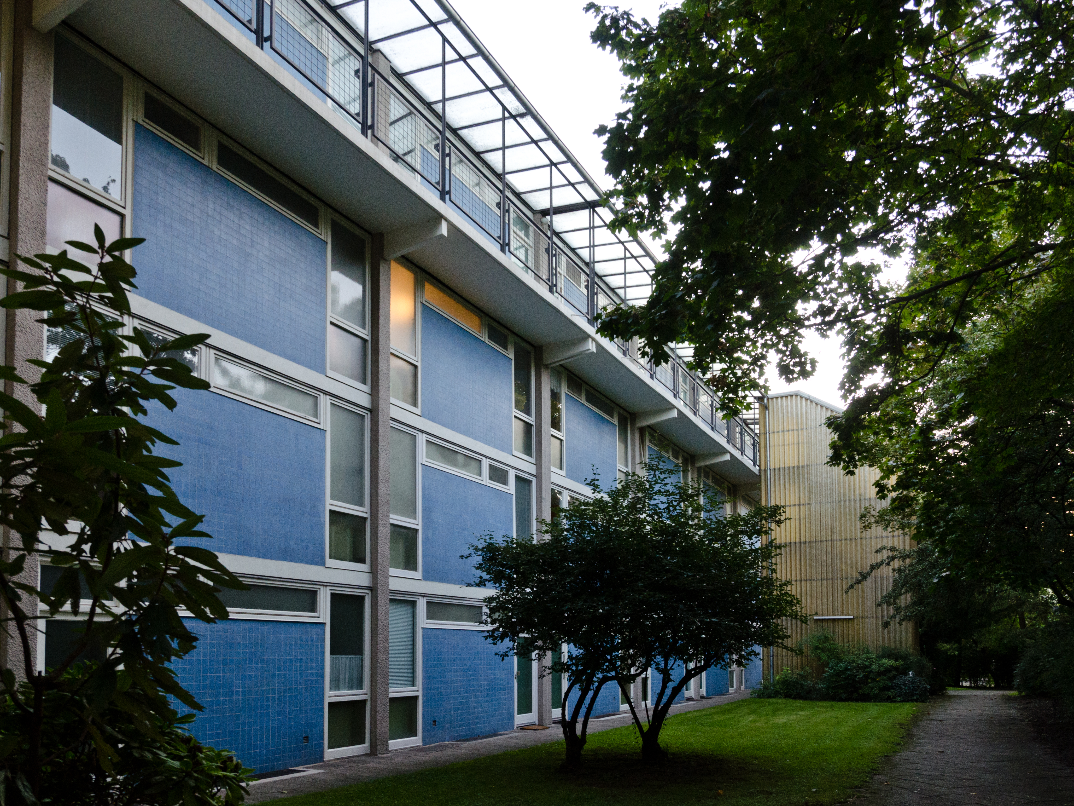 Klopstockstraße 25/27, Wohnanlage, 1957–1958 von Paul Schneider-Esleben